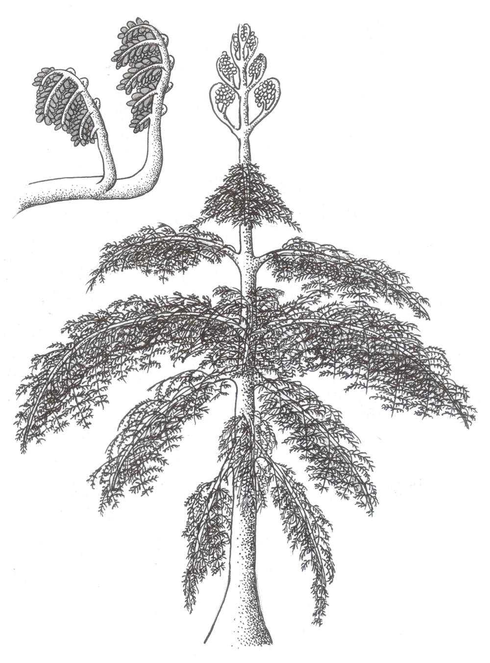 Reconstrucción aproximada del vegetal Tetraxylopteris conocido a partir de sus restos fósiles.